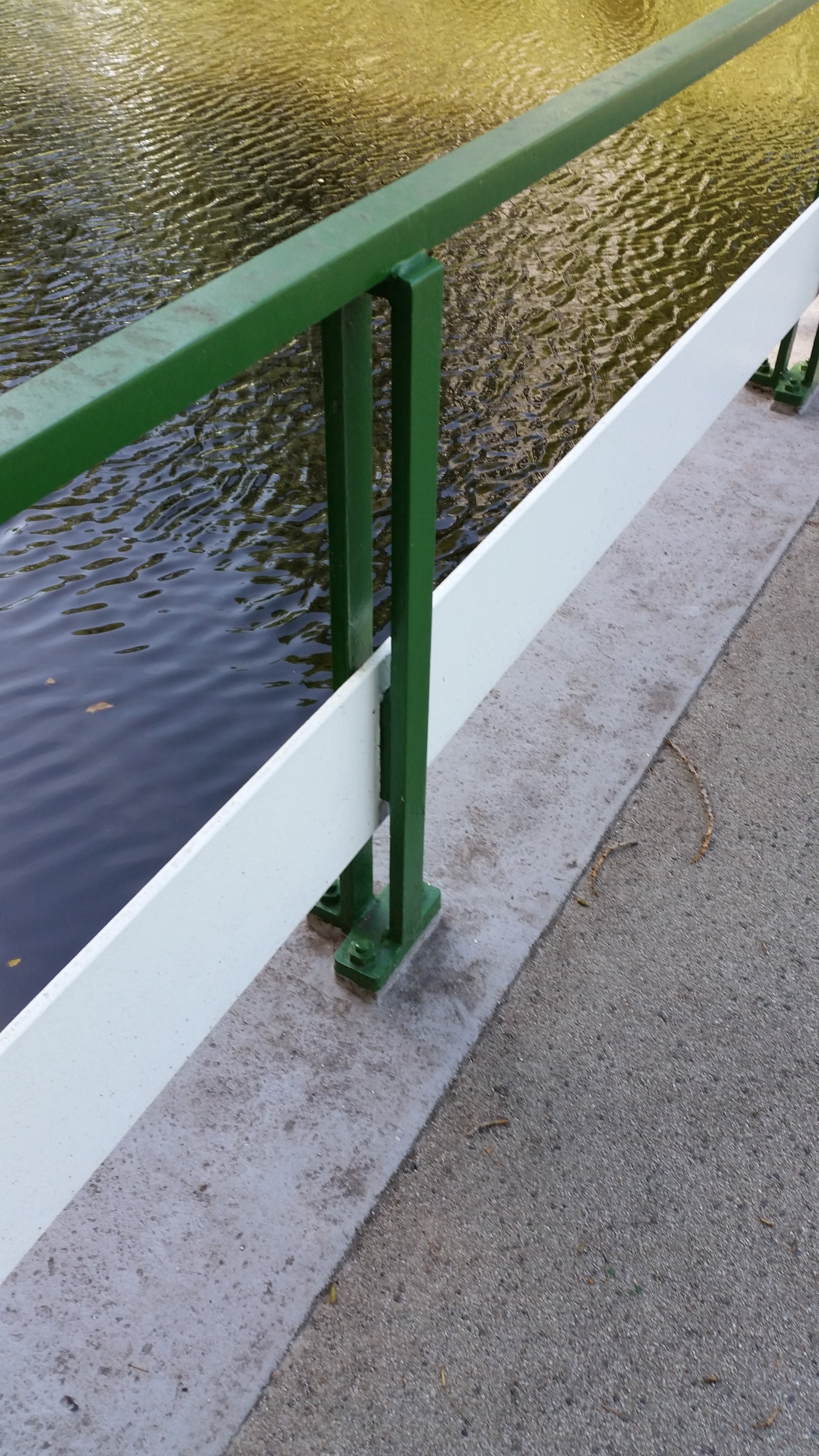 Brug 834, Liesbeth den Uylbrug, detail van de leuning